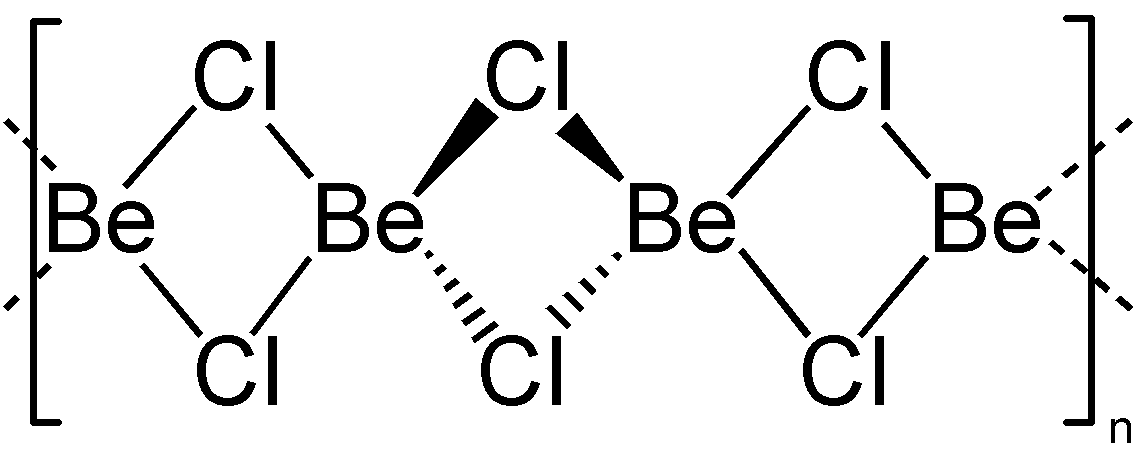 Struktur von polymerem Berylliumchlorid